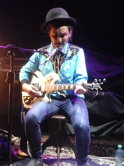 Carlos Rodriguez en vivo.